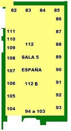 Distribución de las obras de la sala 5, España. Museo Ulpiano Checa.